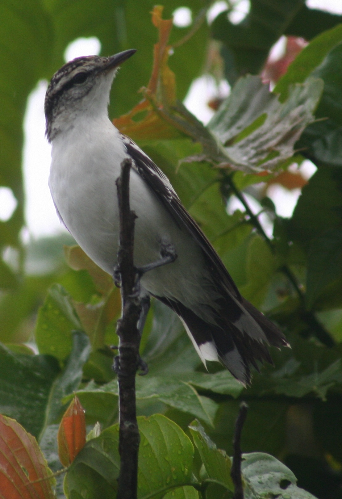 Polynesian Triller Lalage maculosa in Nuku 'Alofa, Tonga